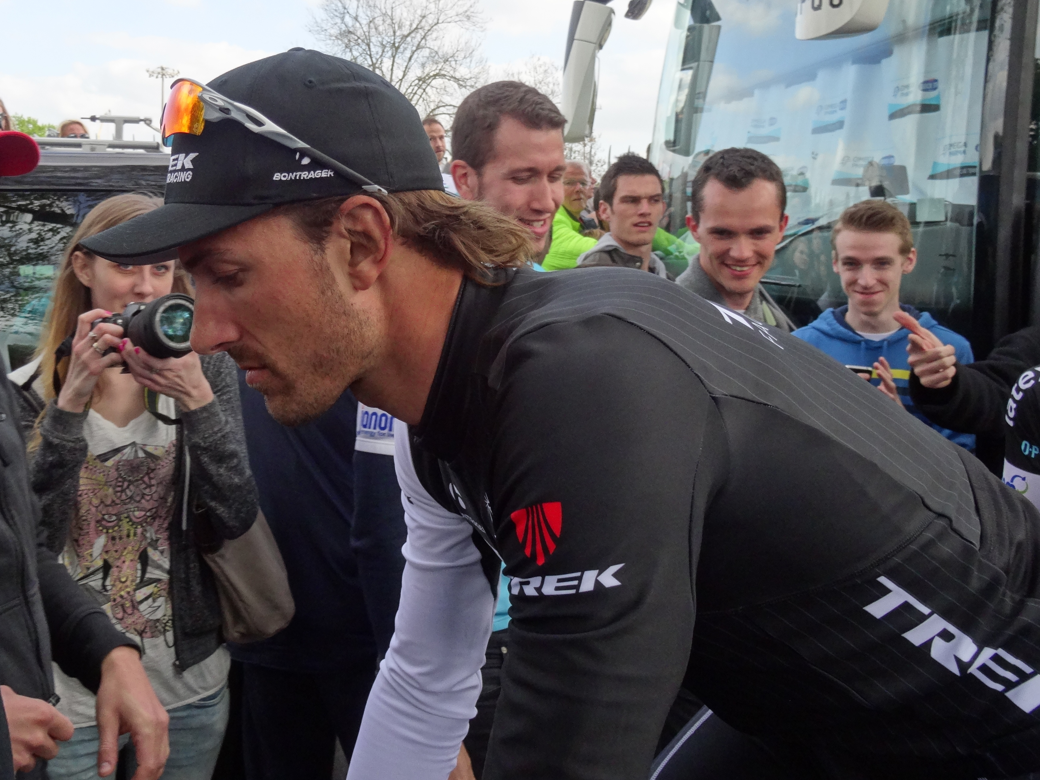 Retour des cyclistes à leurs bus après l'arrivée du Paris-Roubaix 2014 et pendant la remise des prix, le 13 avril 2014, à Roubaix, Nord, Nord-Pas-de-Calais, France. Depicted person: Fabian Cancellara